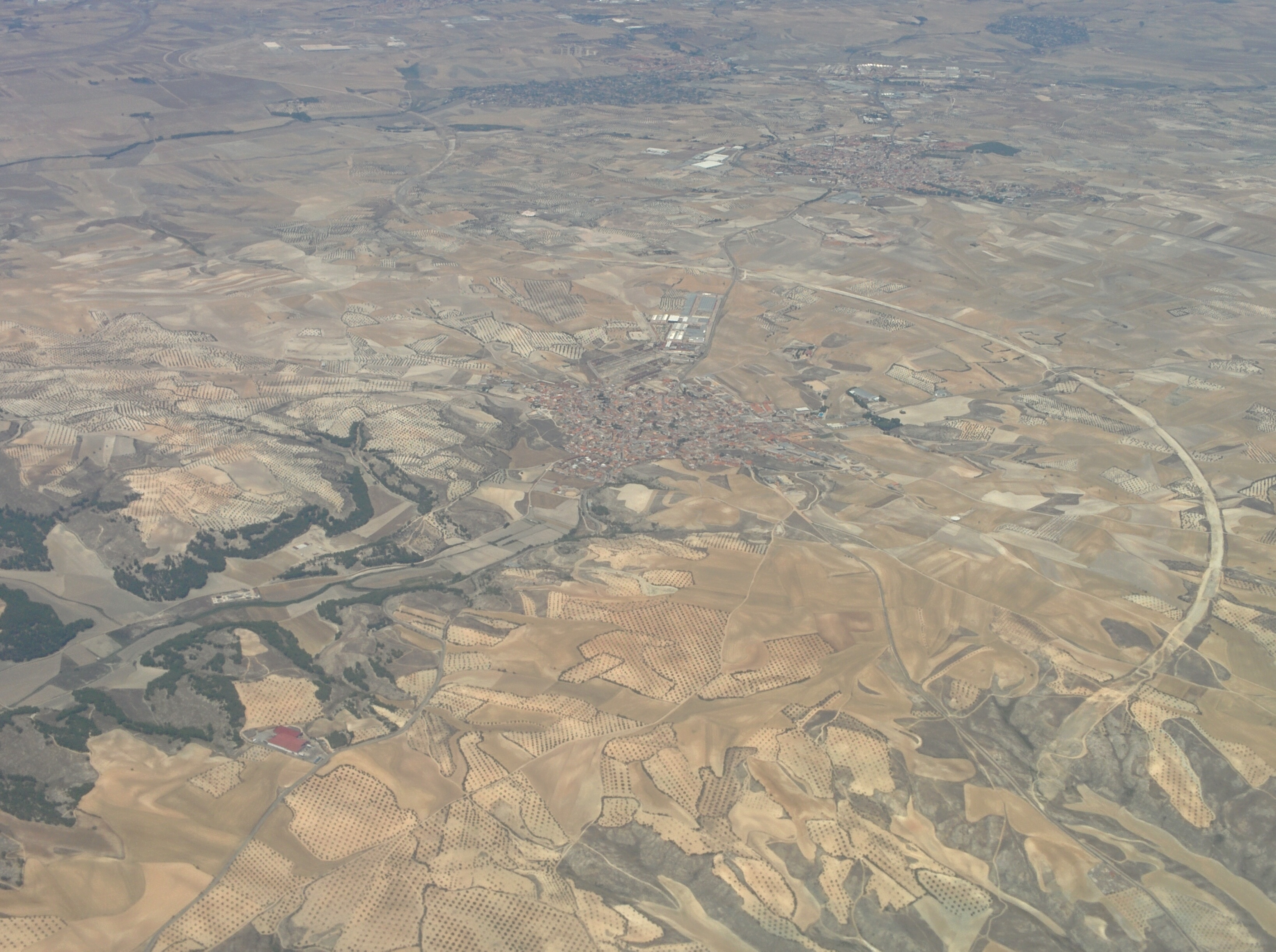 Vista aérea de Borox, en Toledo (España).